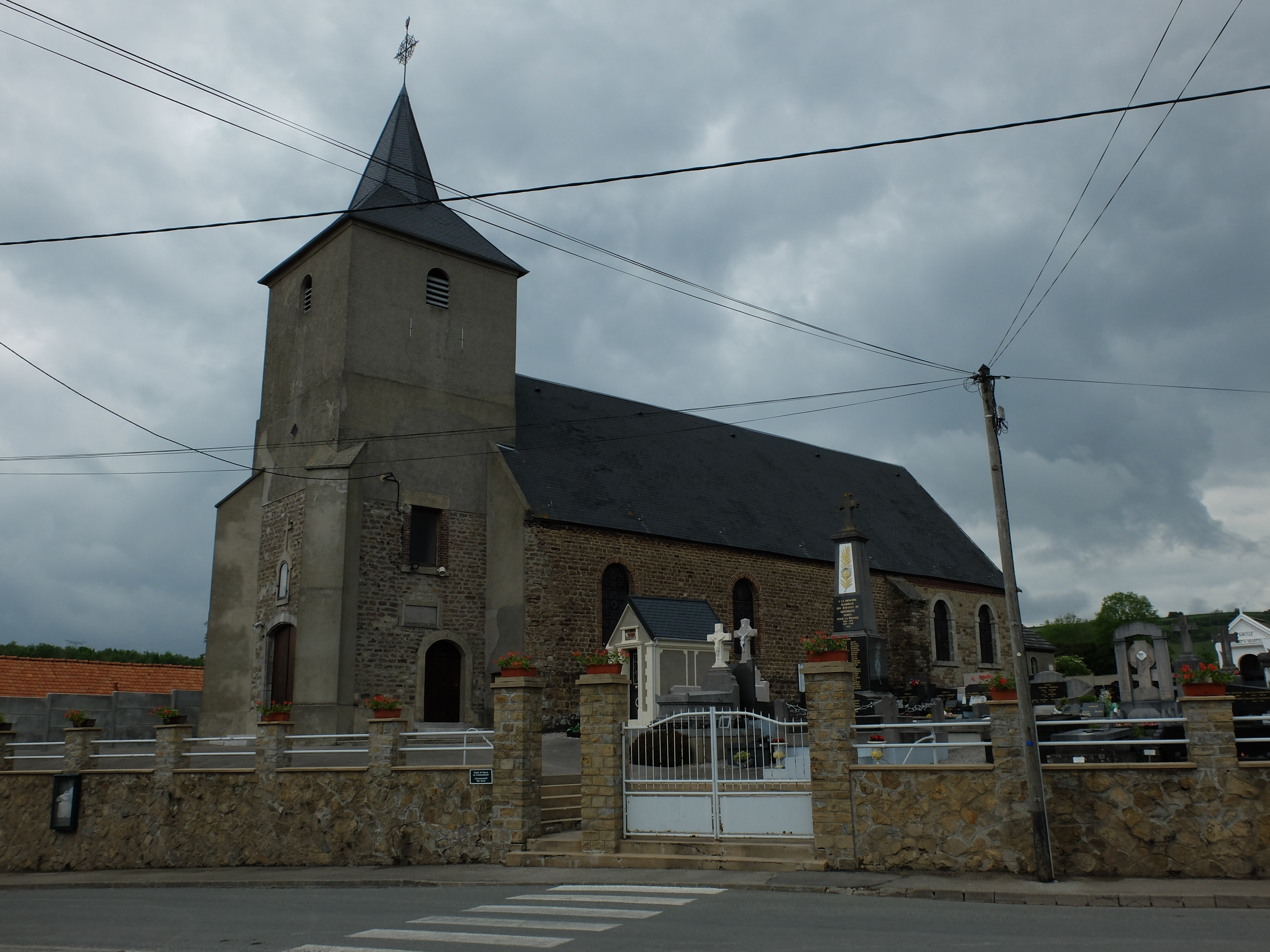 Vue de l'église de Quesques. Le monument aux morts est également sur l'image.